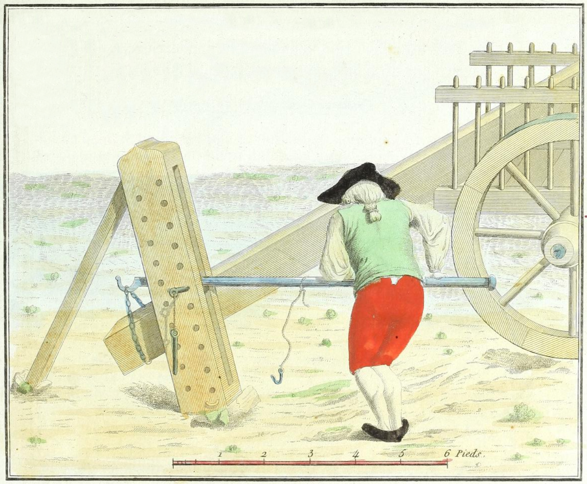 Abbildung einer Hebelade in einem Traktat von François-Joseph Rey de Planazu über landwirtschaftliche Werkzeuge.